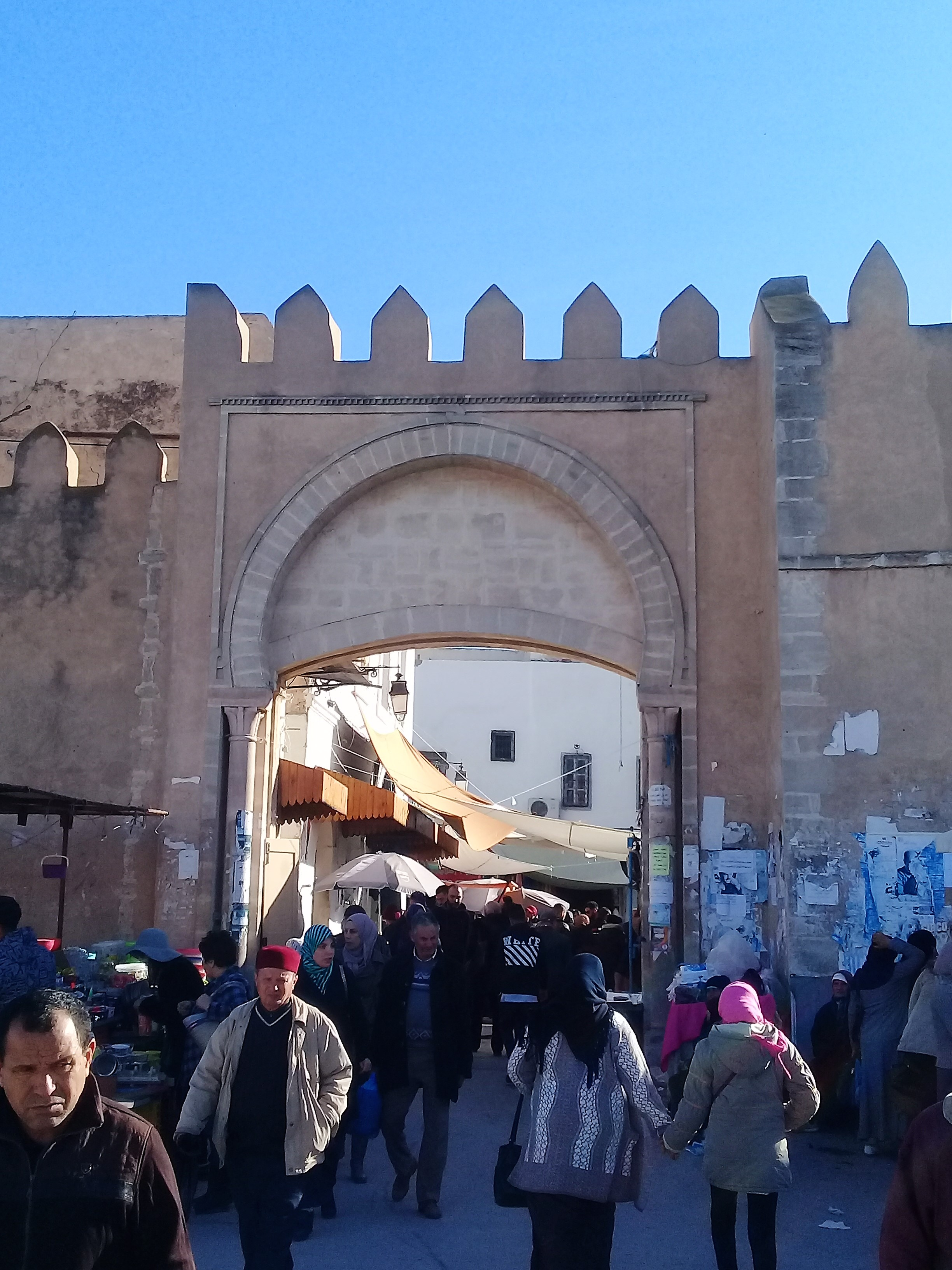 Bab Jebli Jedid